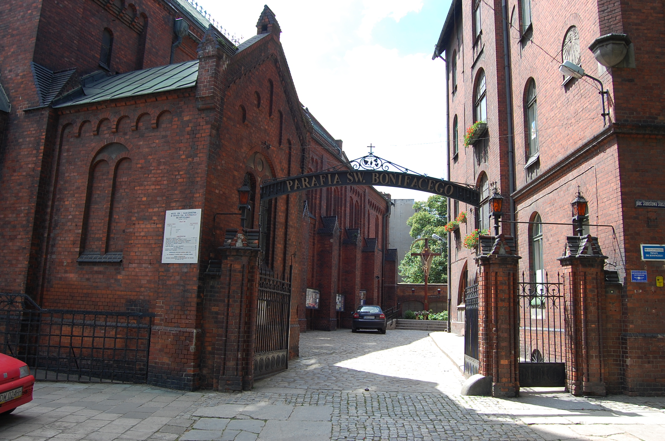 Parafia św. Bonifacego we Wrocławiu wejście na "dziedziniec"